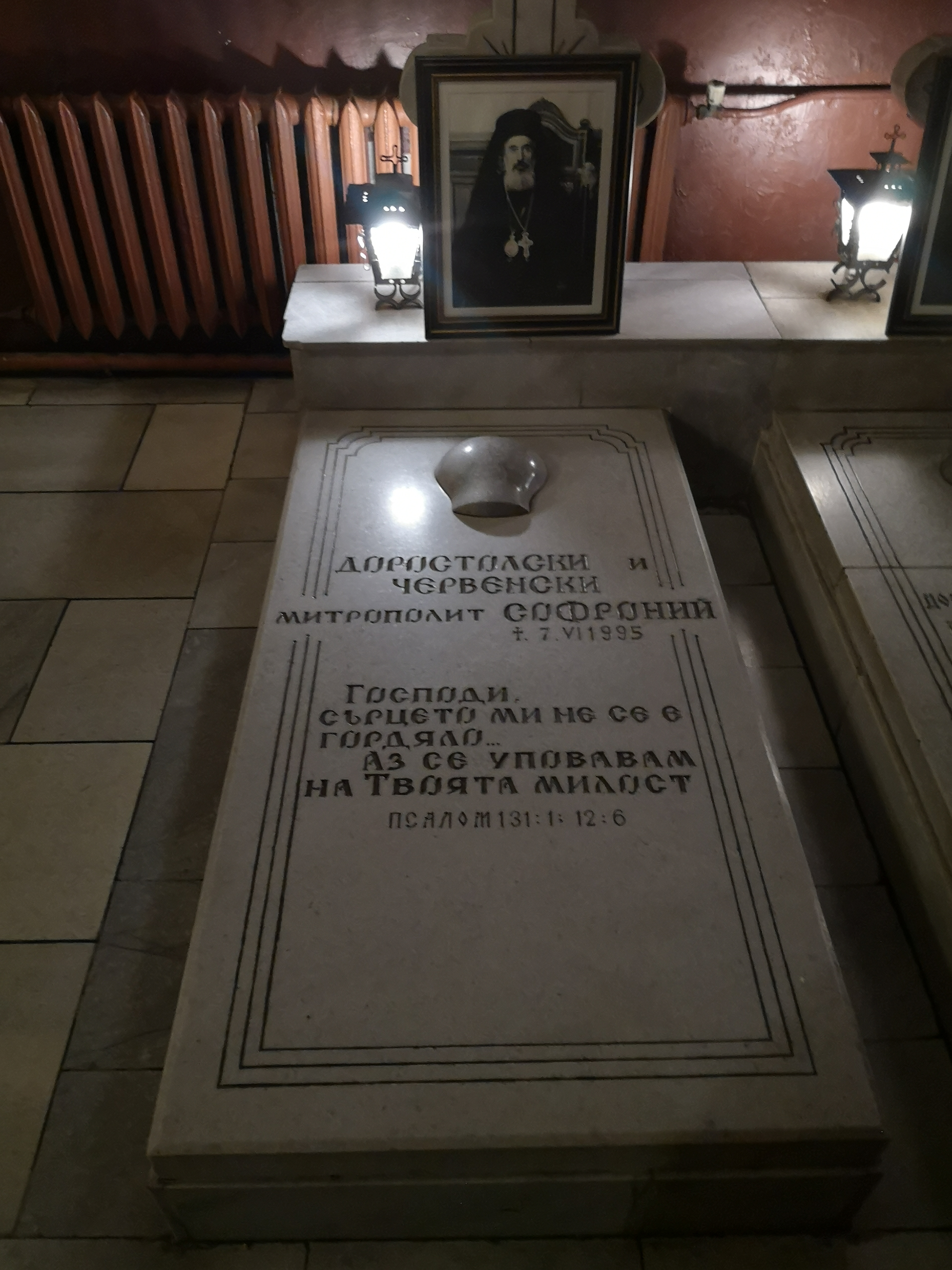 Mogiła metropolity dorostolsko-czerweńskiego Sofroniusza w przedsionku Soboru Trójcy Świętej w Ruse